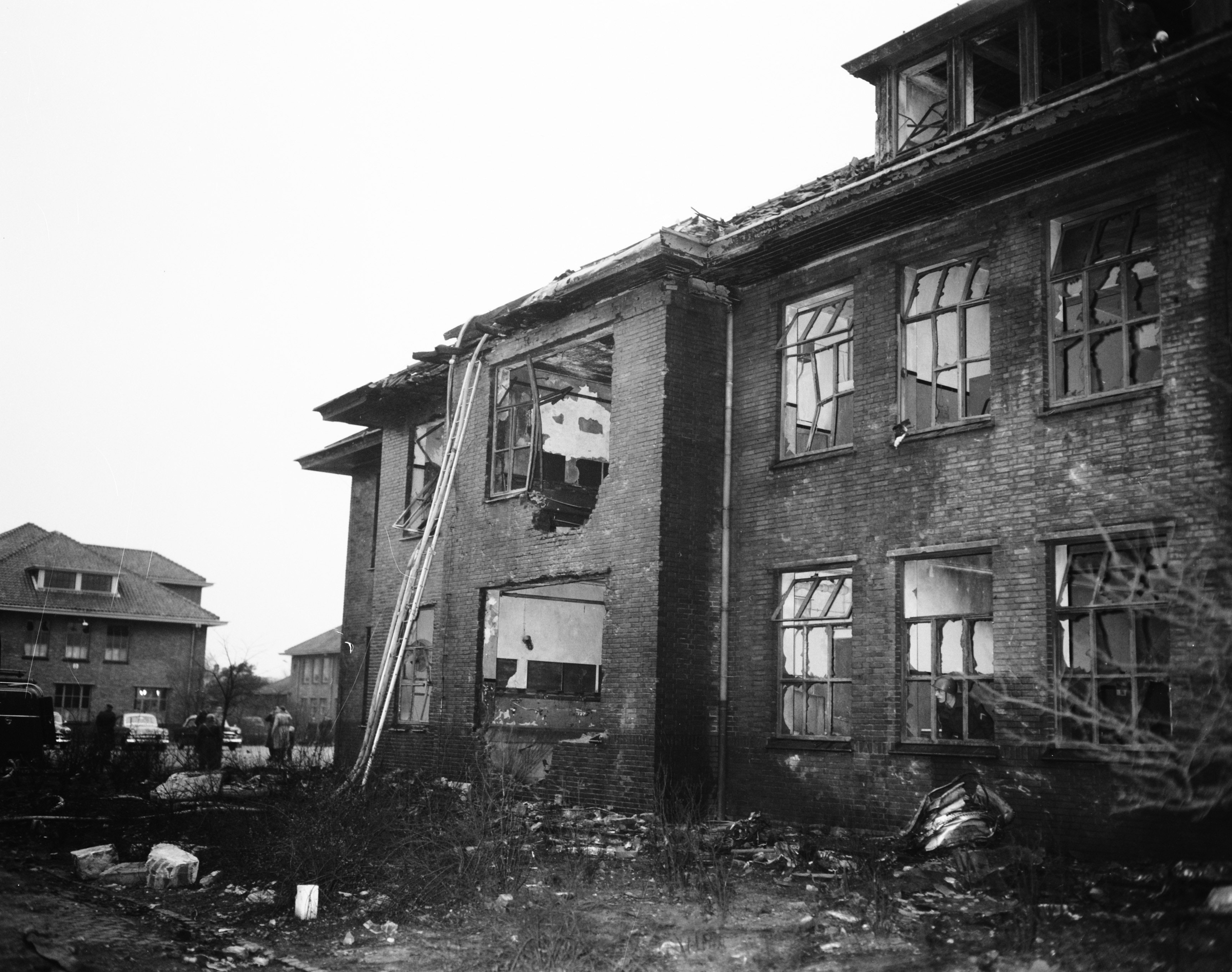 Collectie / Archief : Fotocollectie Anefo Reportage / Serie : [ onbekend ] Beschrijving : F 100c supre sabre neergestort op van de Palmkazerne te Bussum Datum : 14 november 1957 Locatie : Bussum Fotograaf : Bilsen, Joop van / Anefo Auteursrechthebbende : Nationaal Archief Materiaalsoort : Negatief (zwart/wit) Nummer archiefinventaris : bekijk toegang 2.24.01.04 Bestanddeelnummer : 909-1123